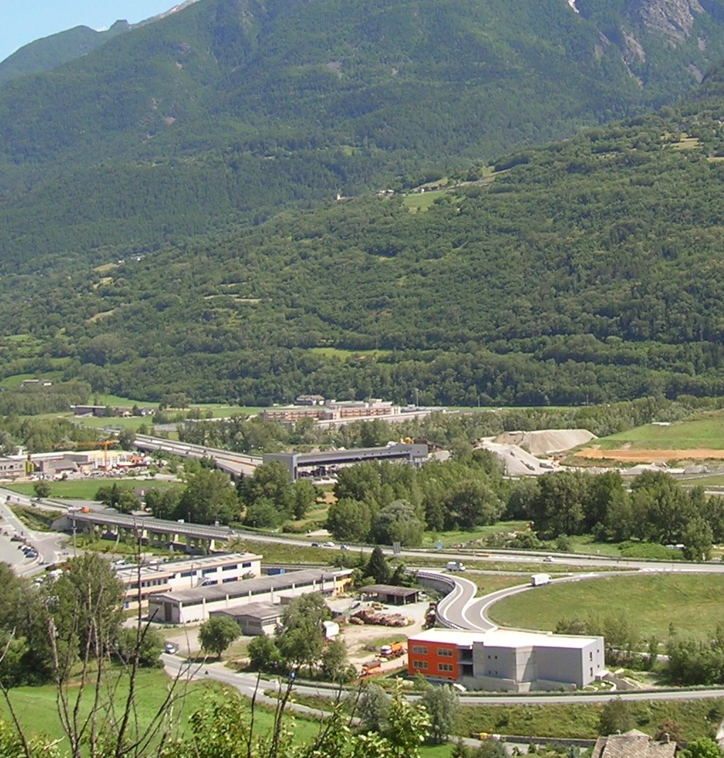 Localizzazione della casa circondariale di Brissogne e Aosta